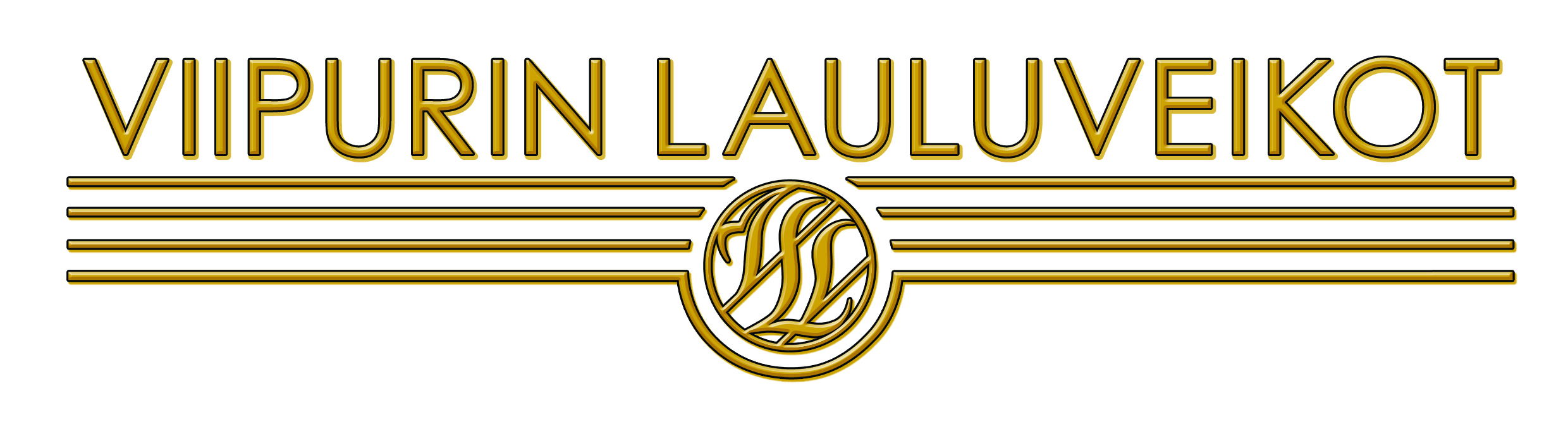 Viipurin Lauluveikkojen logo